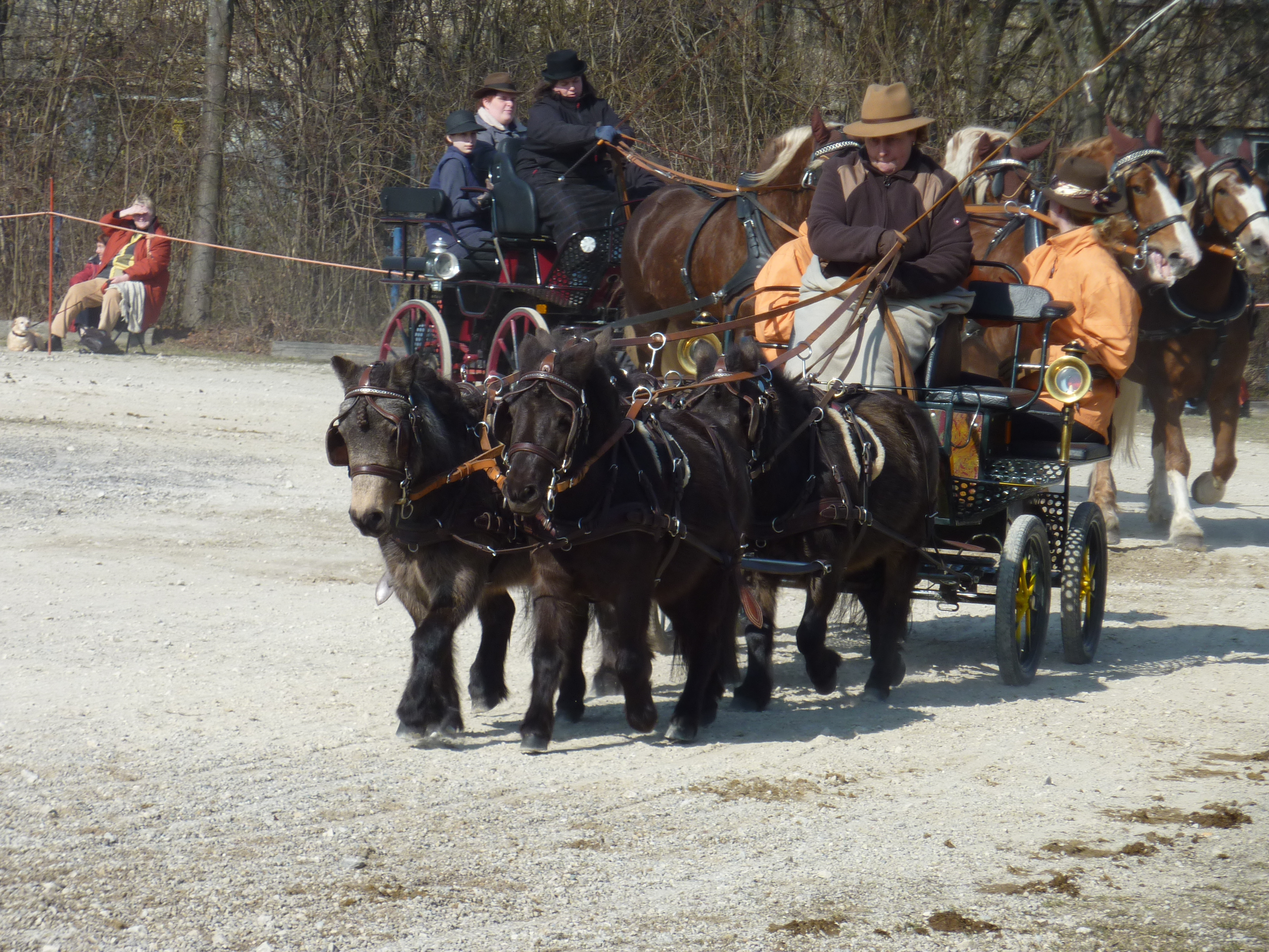 Bernhausener Pferdemarkt